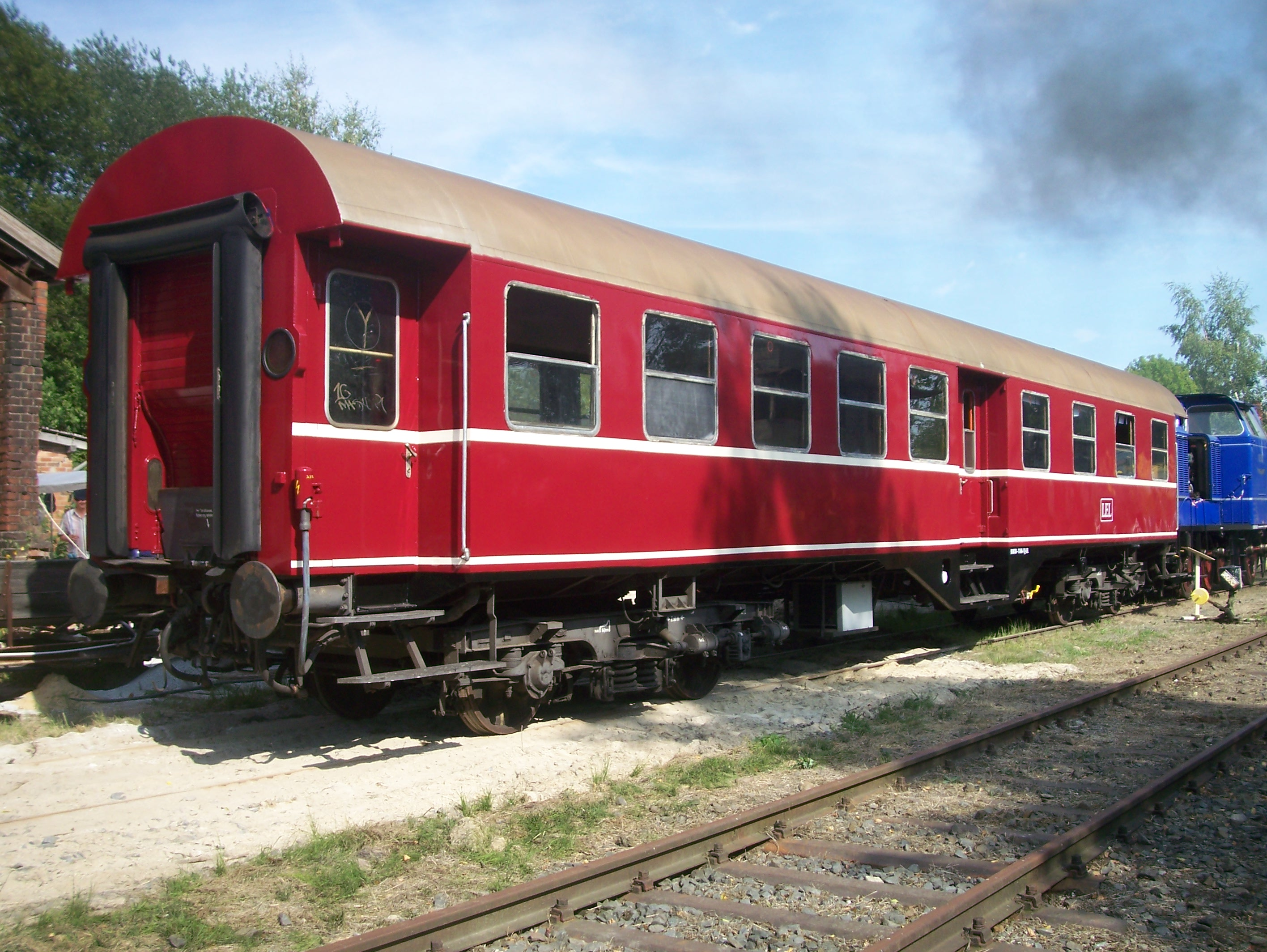 Ehemaliger Umbauwagen der Gattung AB4yg, heute Gesellschaftswagen der Landeseisenbahn Lippe e.V. und in Anlehnung an die Zwischenwagen der ET 65 in rot lackiert